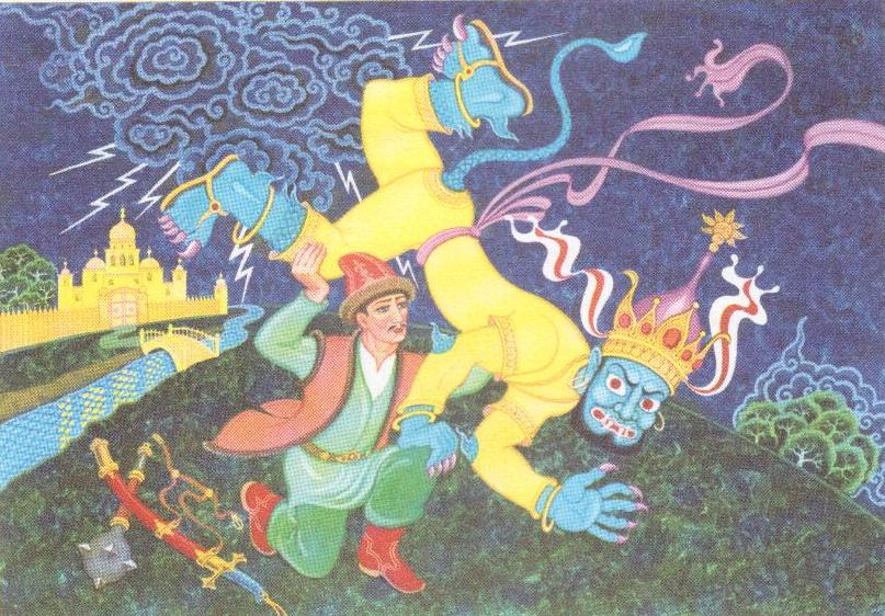 Юноша борится с дэвом Татарча/tatarça: Егет дию пәрие белән көрәшә